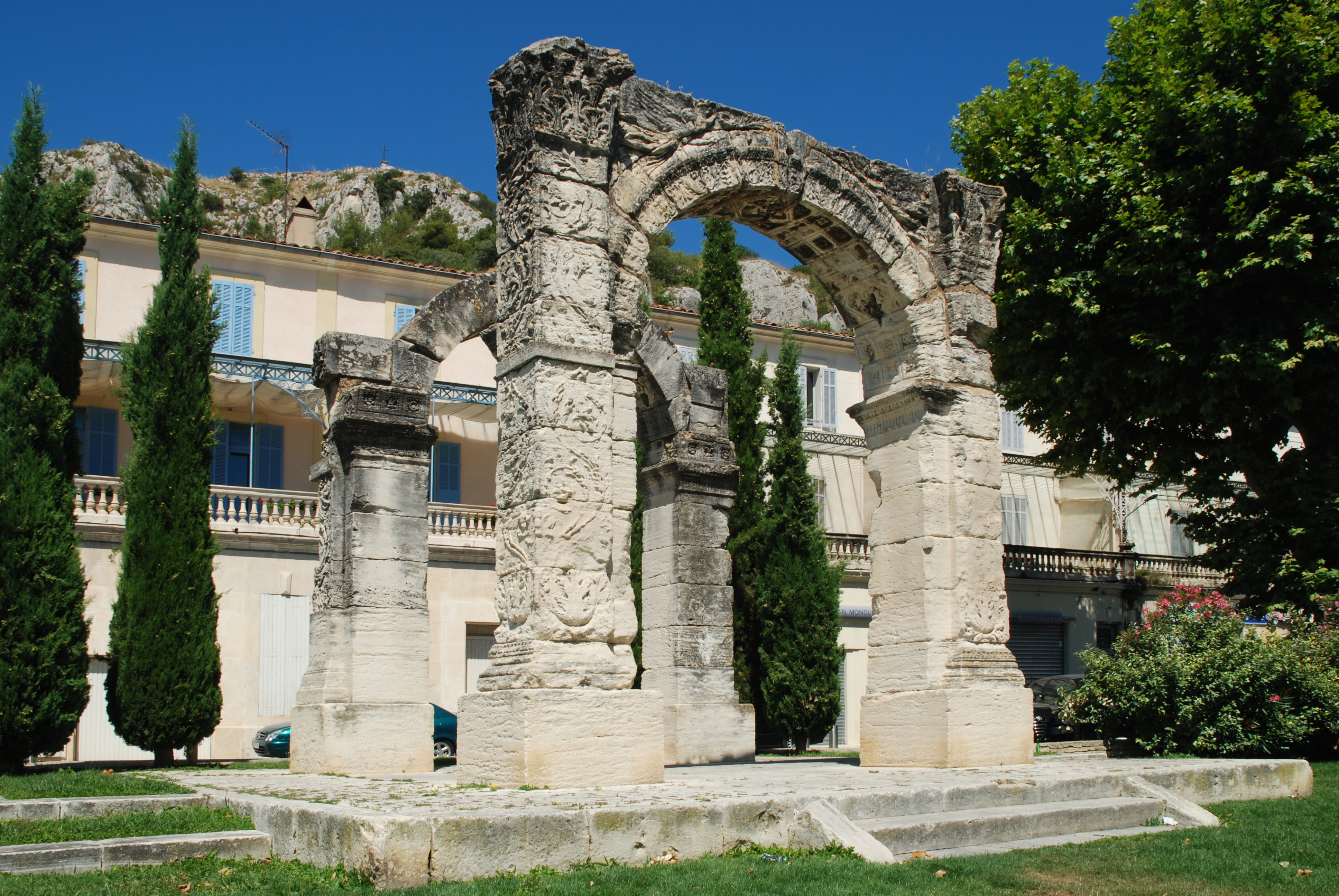 France - Provence - Vaucluse - Arc antique de Cavaillon